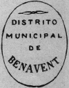 Escut antic de Benavent de la Conca (Isona i Conca Dellà, Pallars Jussà)